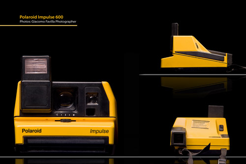 Polaroid camera